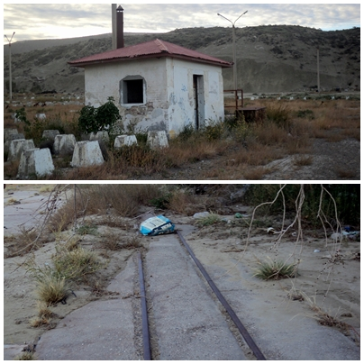 Puesto de control y restos de control y restos de vías de poco ancho